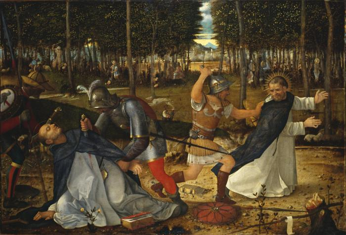 Giovanni Bellini (e aiuti) - Assassinio di San Pietro martire 68x100 cm - olio su pannello anno: 1509 Courtauld Gallery - Londra